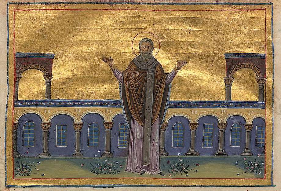 Святой Иоанн IV Постник, Патриарх Константинопольский Константинополь. 985 г. Миниатюра Минология Василия II. Ватиканская библиотека. Рим.